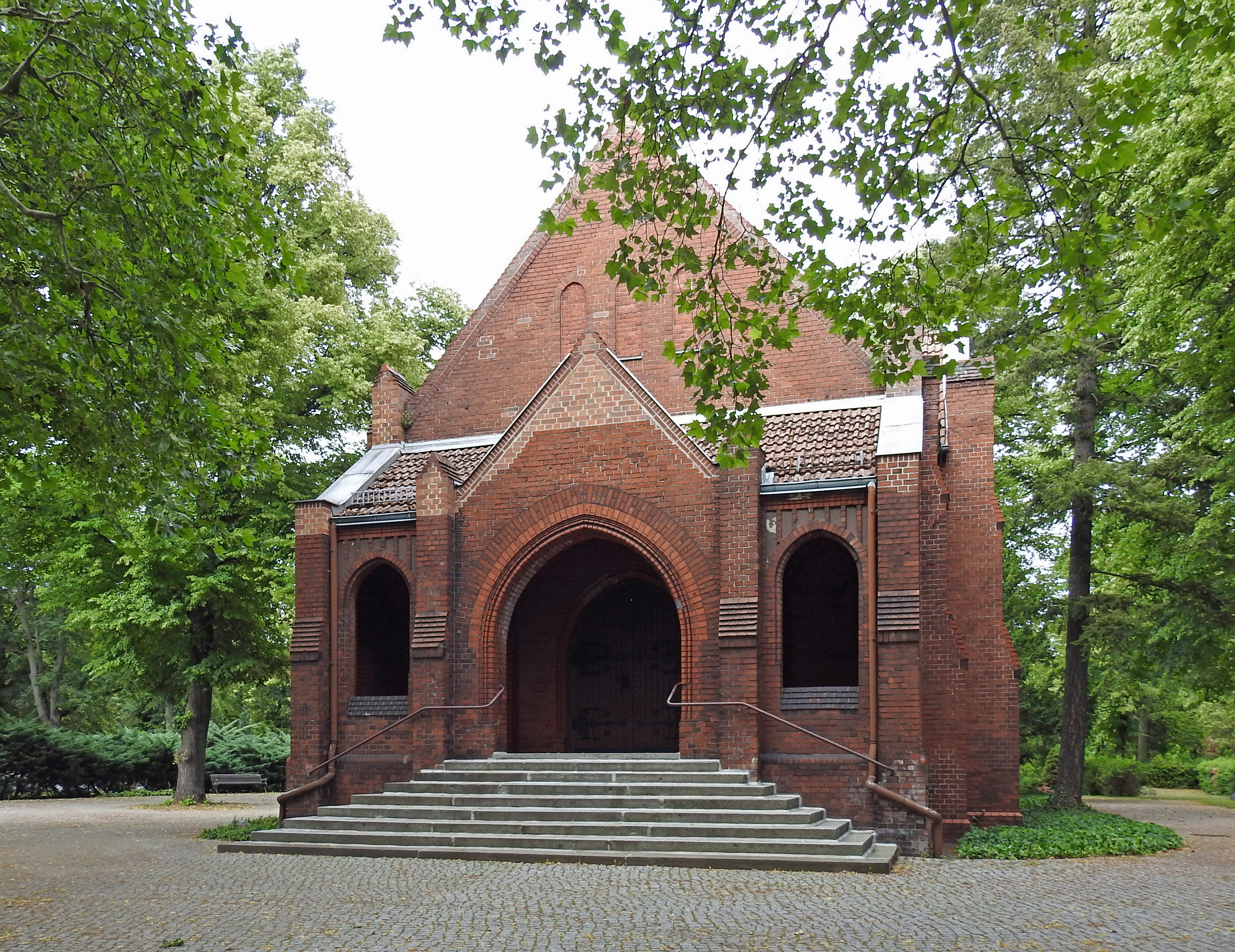 Friedhofskapelle des Friedhofs Pankow III in Berlin This is a photograph of an architectural monument. ,T,001